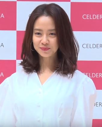 디스패치 구독 클릭! Dispatch Subscribe